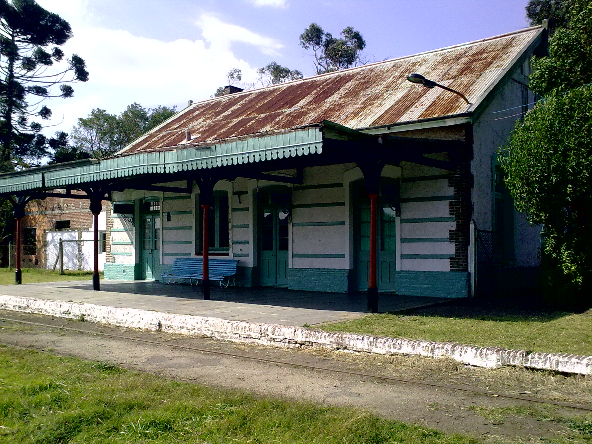 Estación Chapadmalal (FCGR)